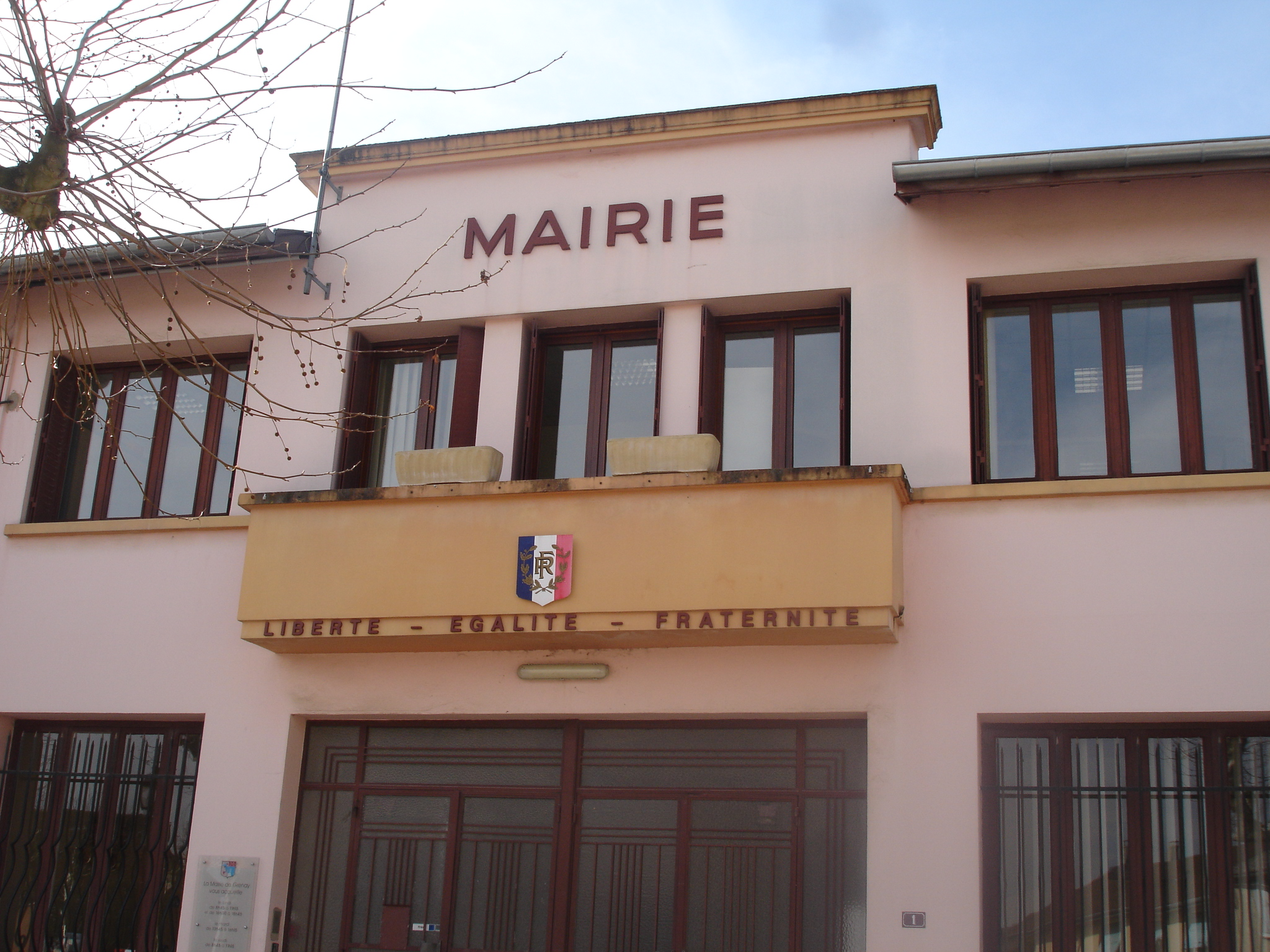 Grenay (38) : La mairie vue du fronton